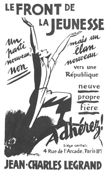 Reproduction d'un document de propagande du Front de la jeunesse (1937-1939).